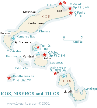 Mapa de la isla de Cos, perteneciente al archipiélago del Dodecaneso (Grecia)